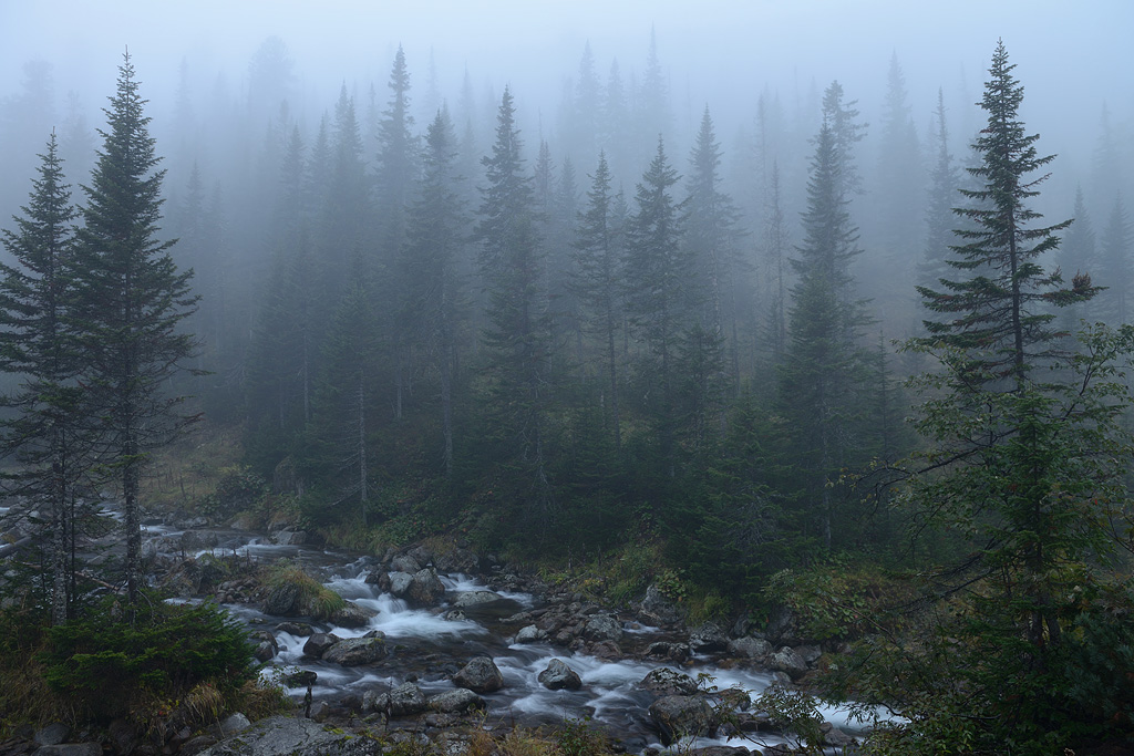 Байкальский заповедник. Горная речка Осиновка, вдоль нее идет тропа к берегу Байкала, к поселку Танхой.